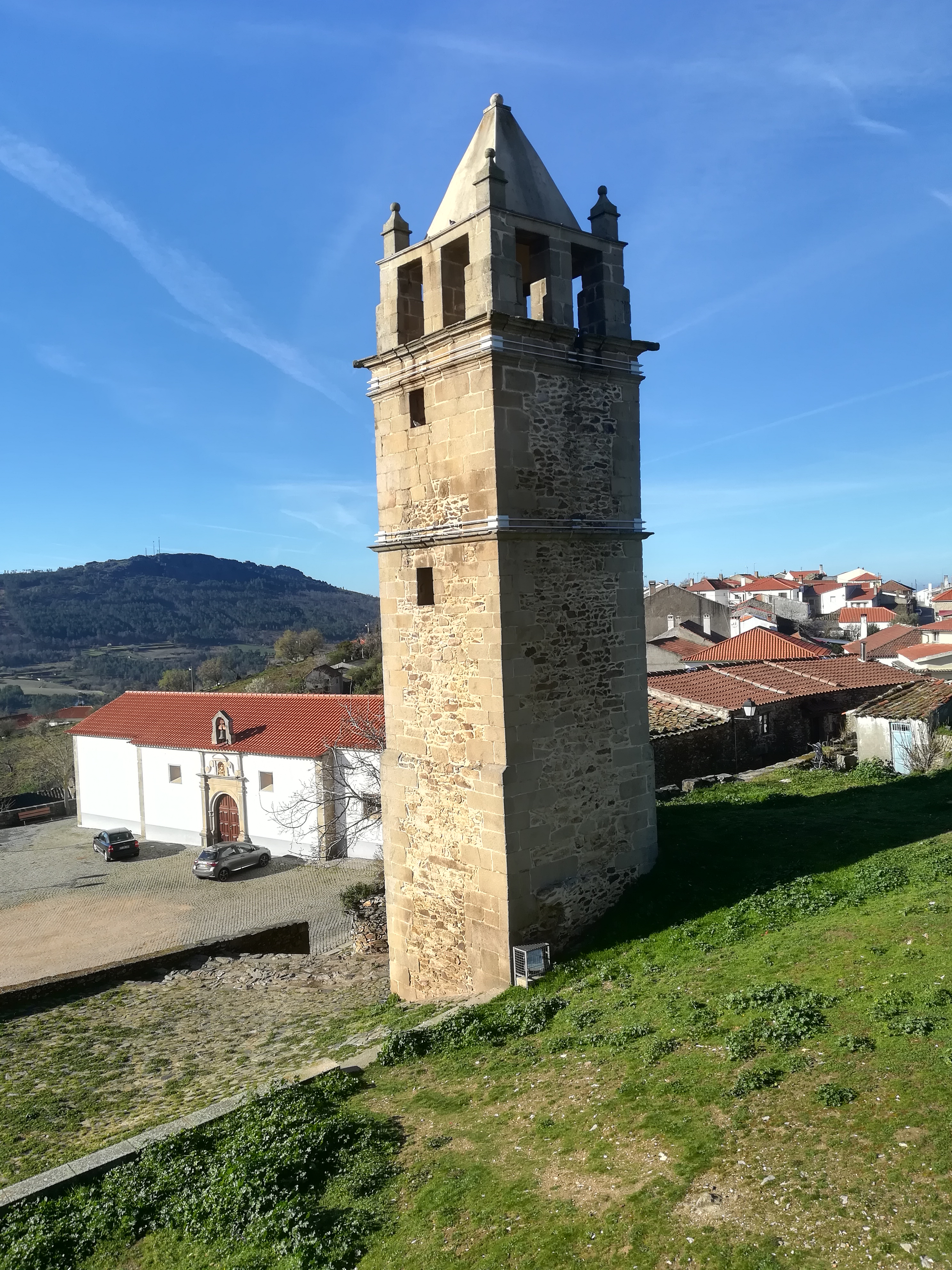 Mogadouro Castle and Church